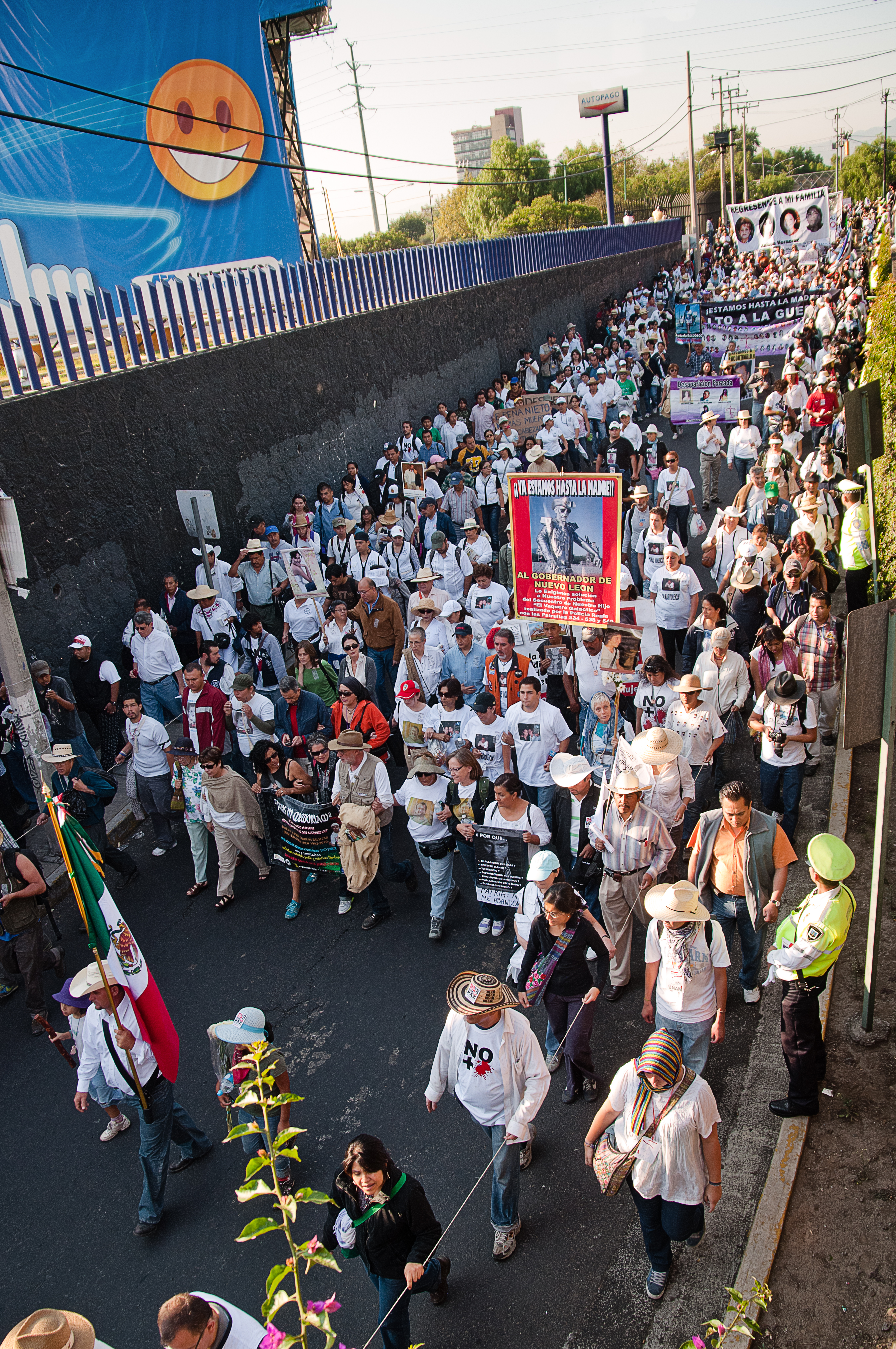 Encabezada por el poeta Javier Sicilia y un contingente de las víctimas del crímen organizado, la corrupción y la violencia de Estado, la marcha llegó de Cuernavaca a Ciudad Universitaria.